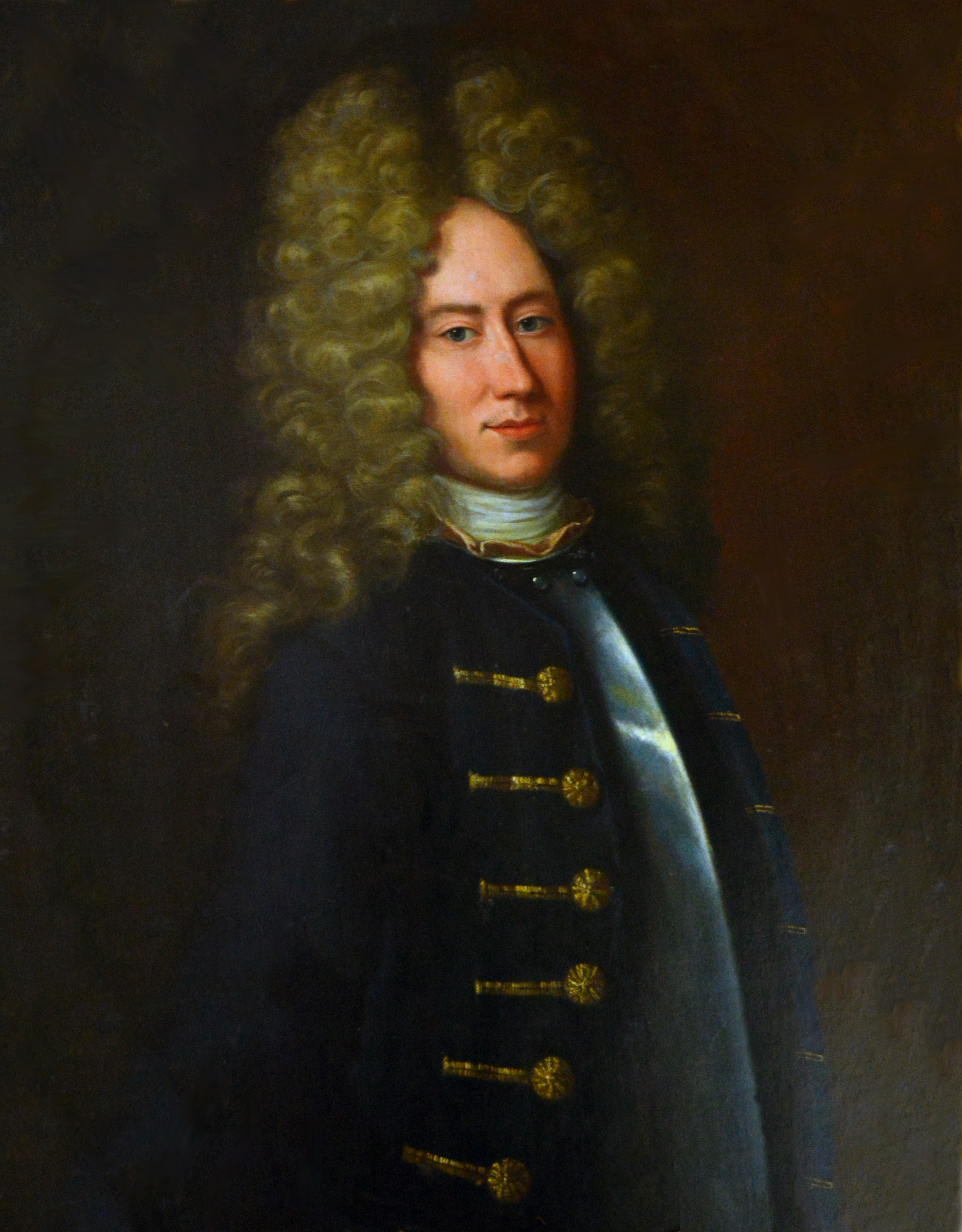 Portrait of Henrik Magnus von Buddenbrock, Swedish